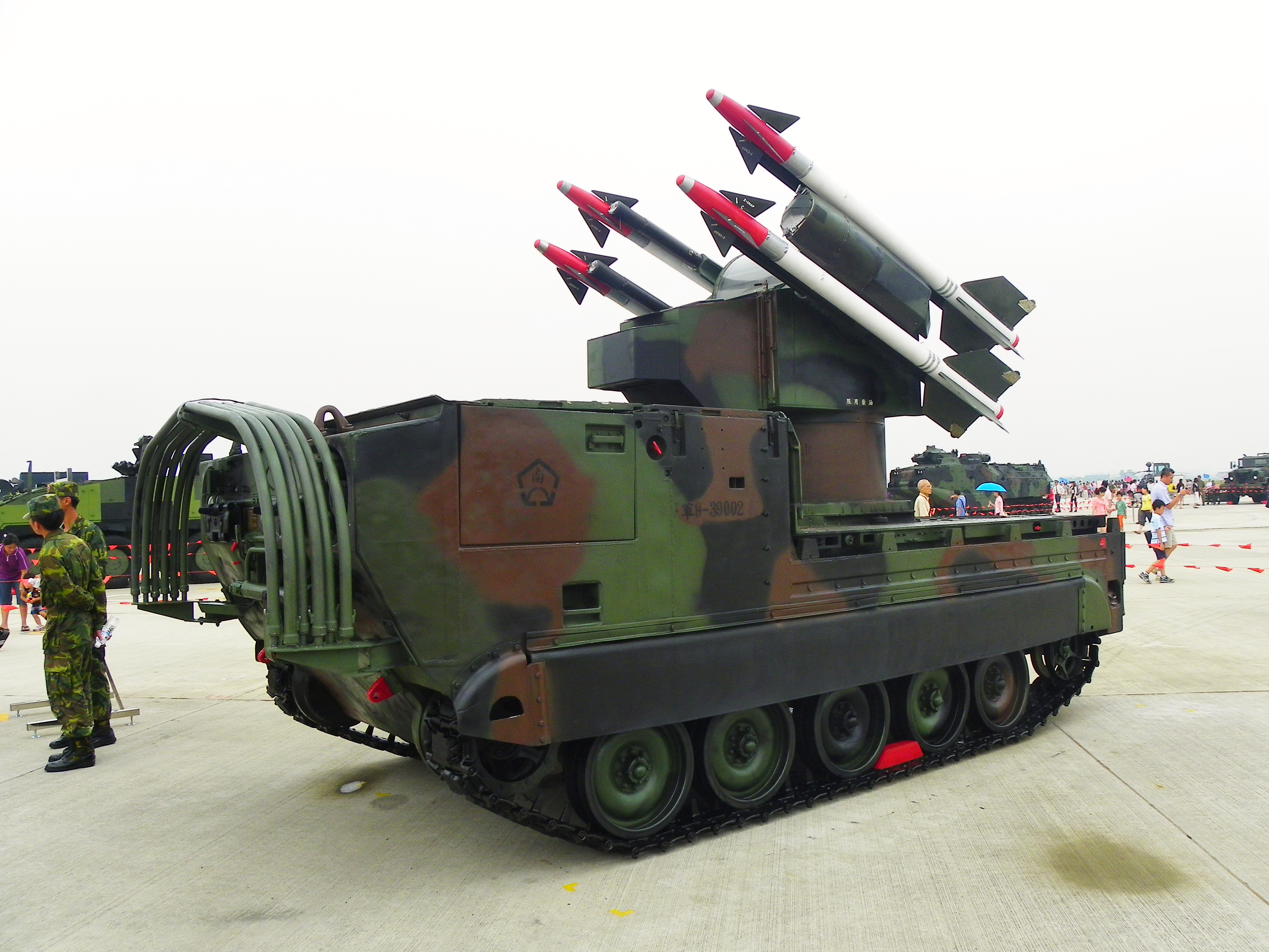 2011年空軍岡山基地營區開放活動，展示之陸軍M730A1檞樹飛彈車。